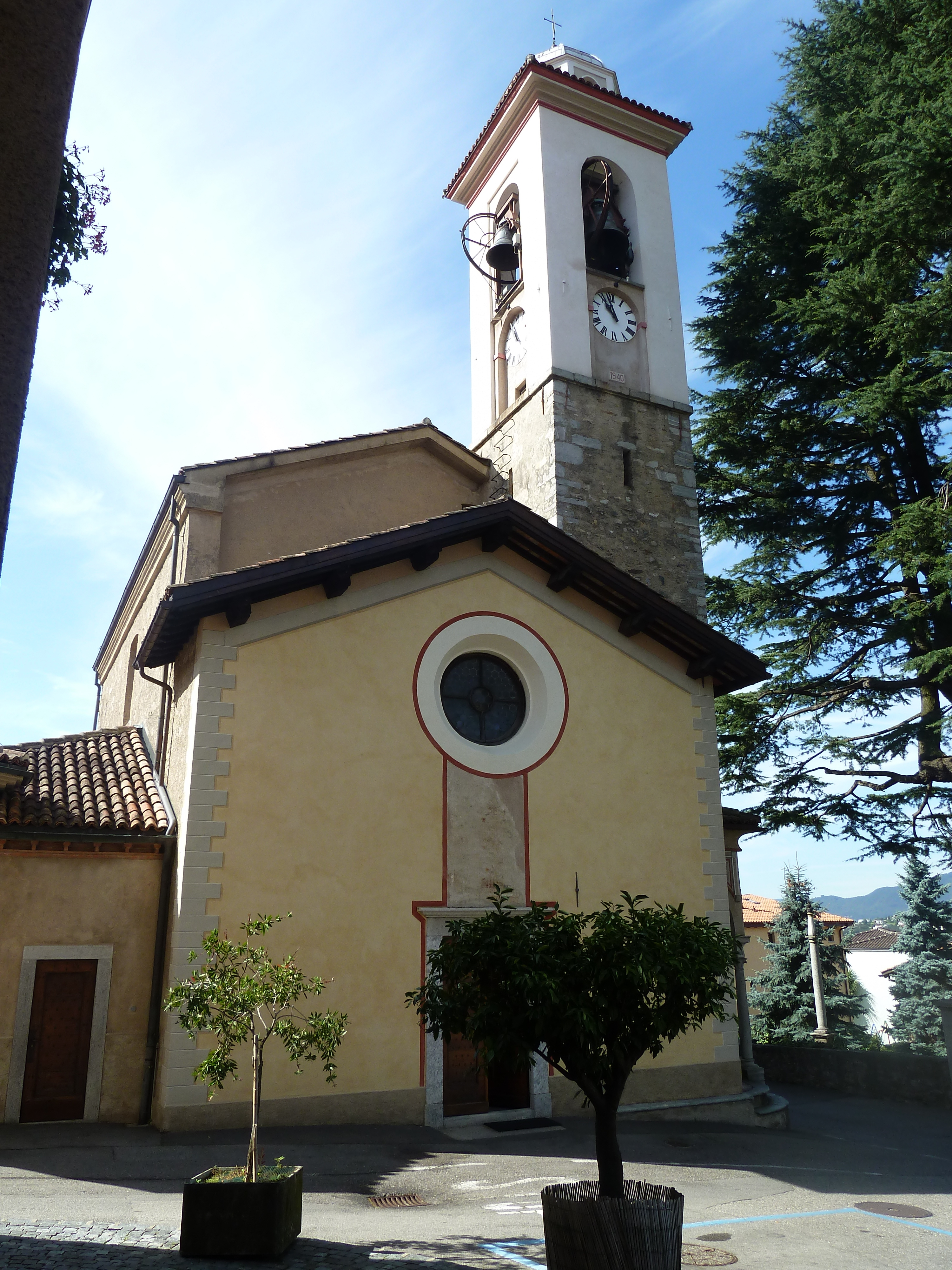 Cadro - Chiesa Sant'Agata